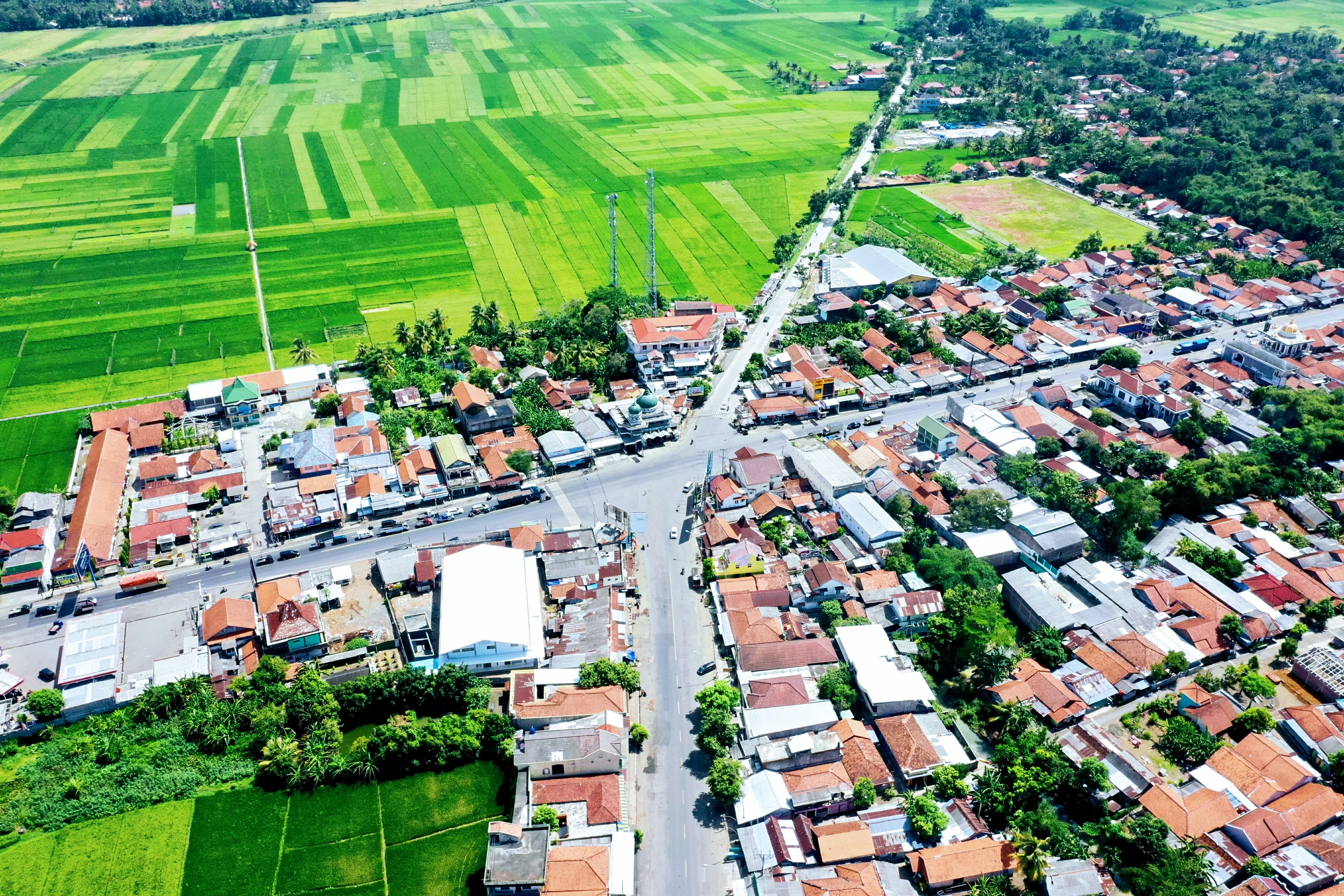 Perempatan Buntu tahun 2020